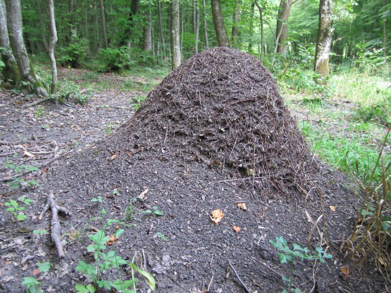 Fourmilière, cliché personnel, été 2005. 800 X 600 pixels